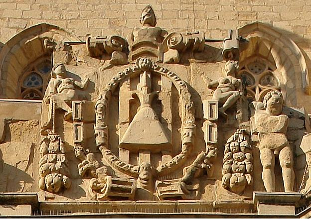 Detalle de la labra heráldica en la fachada de la Iglesia de Santa María de Montblanc (Tarragona)